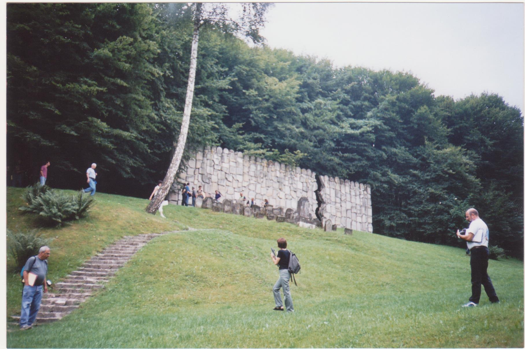 המצבה בדרך לקז'ימייז' דולני, פולין, לזכר יהודי העיירה. יולי 2002